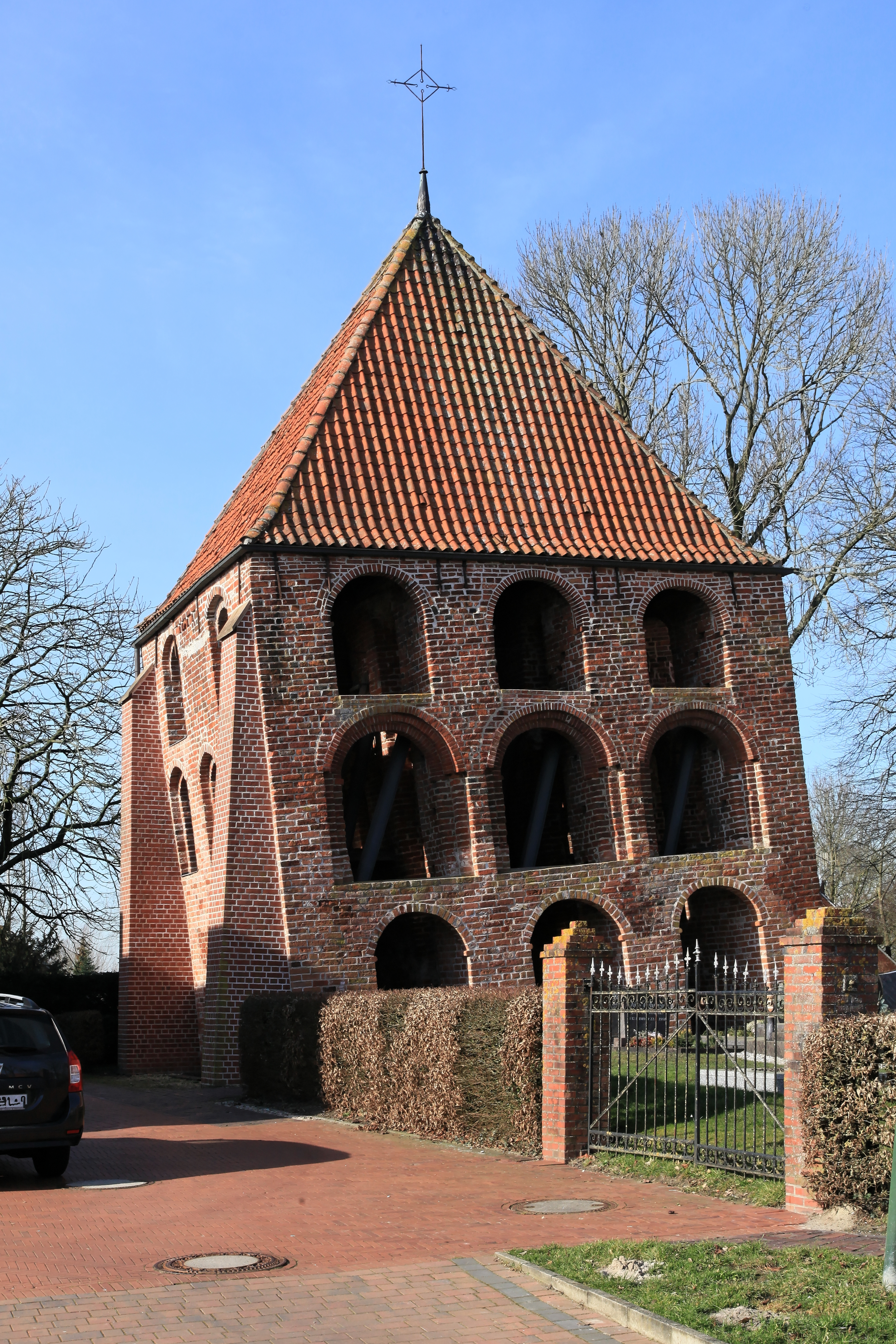 Friedhof und Glockenturm, Denkmalstraße in Midlum, Jemgum